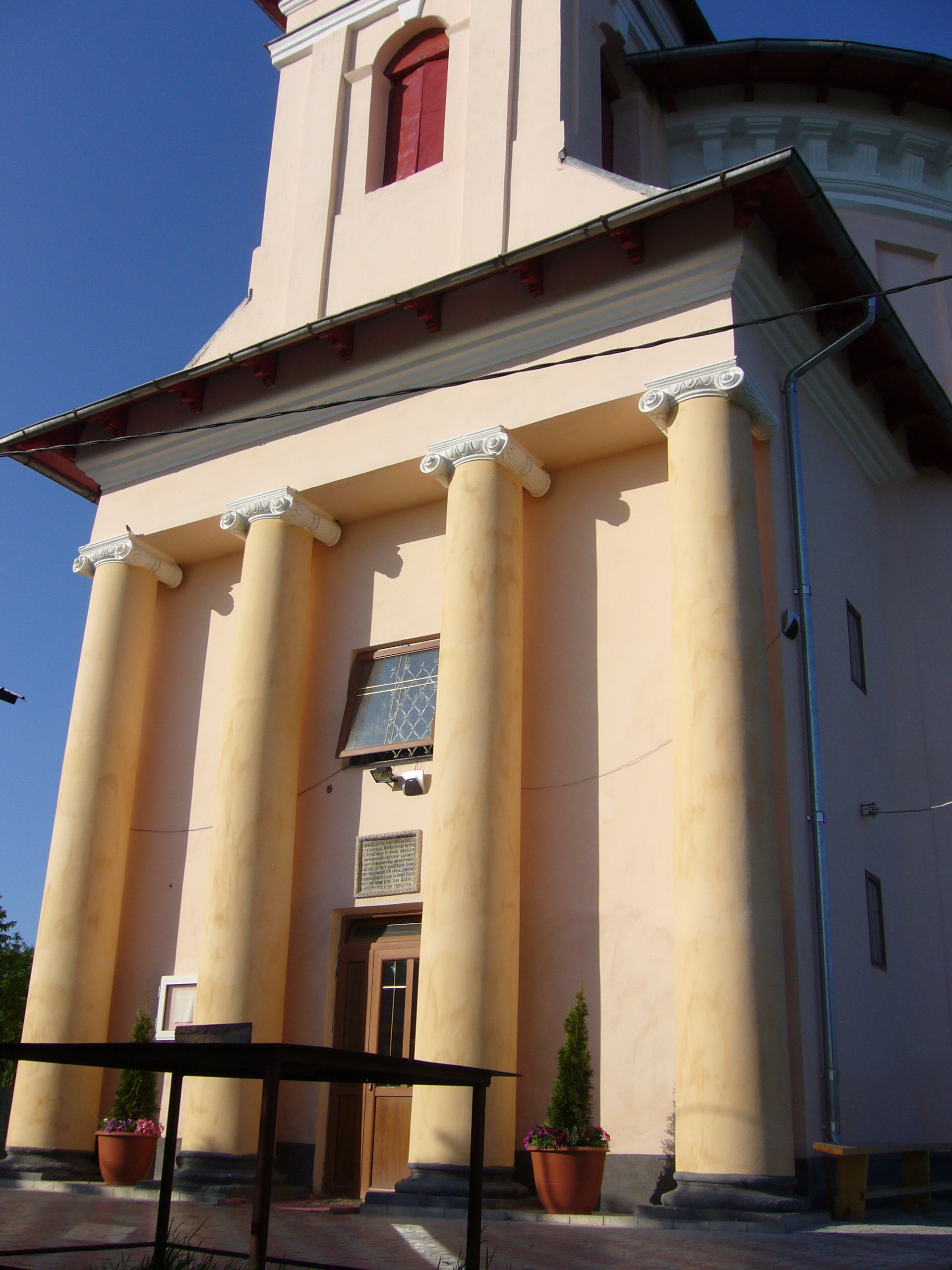 Biserica rotundă din Leţcani.